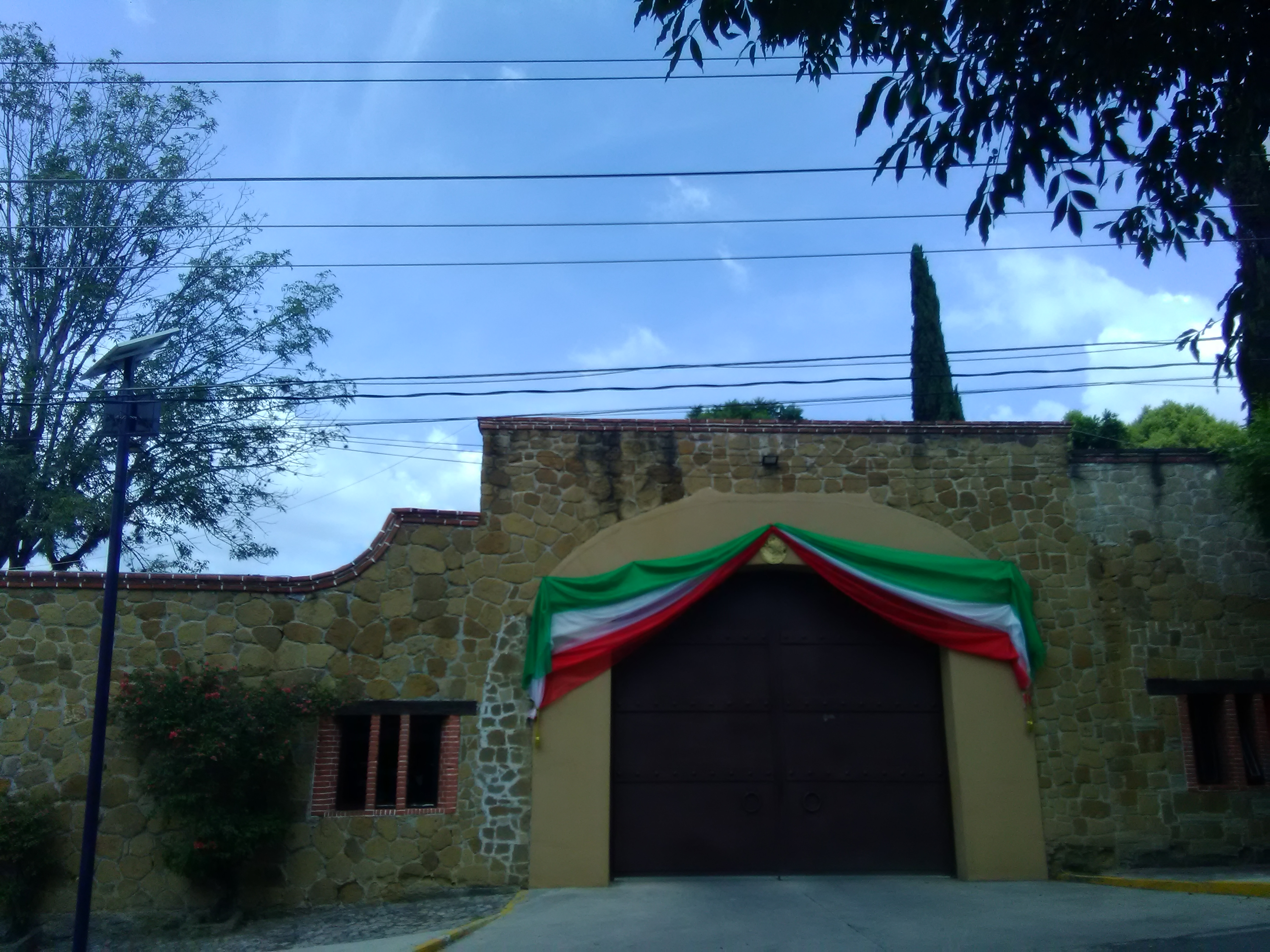 Residencia del Gobernador en turno del Estado de Tlaxcala